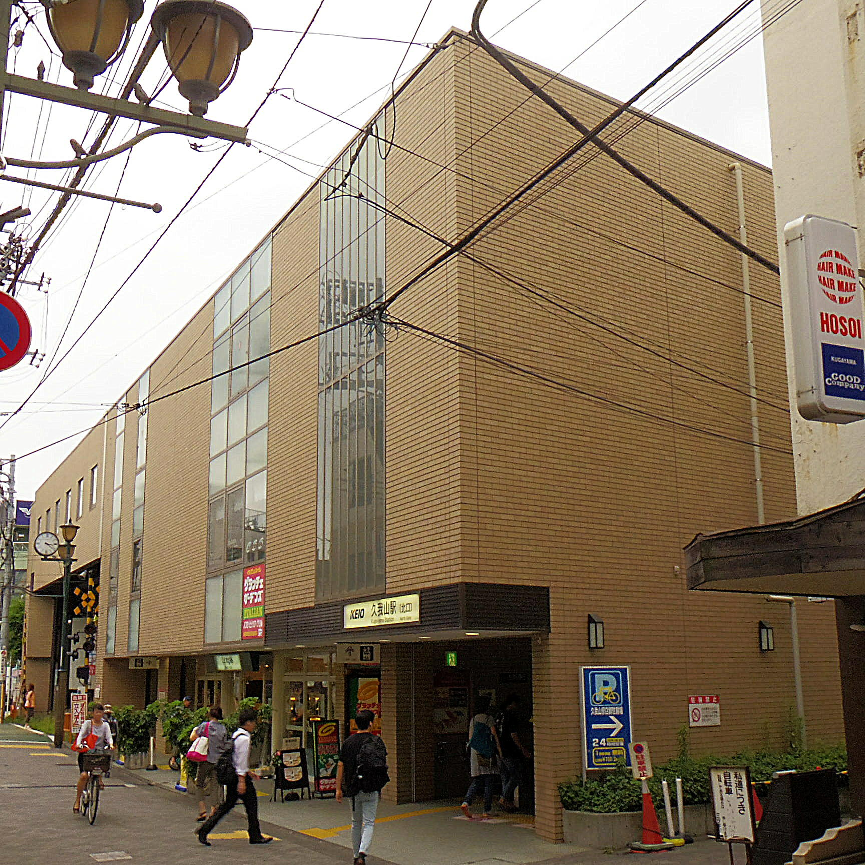 京王井の頭線久我山駅（2016年6月19日撮影）